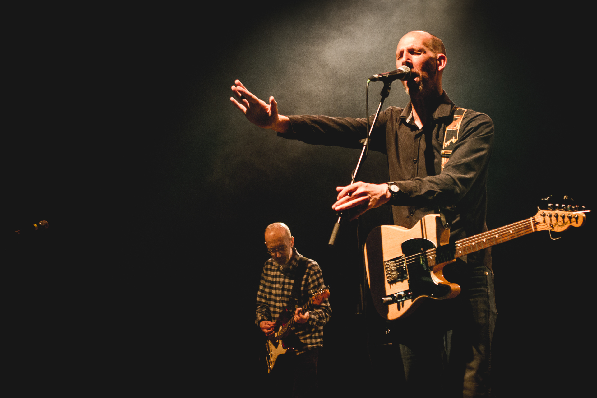 Half Man Half Biscuit